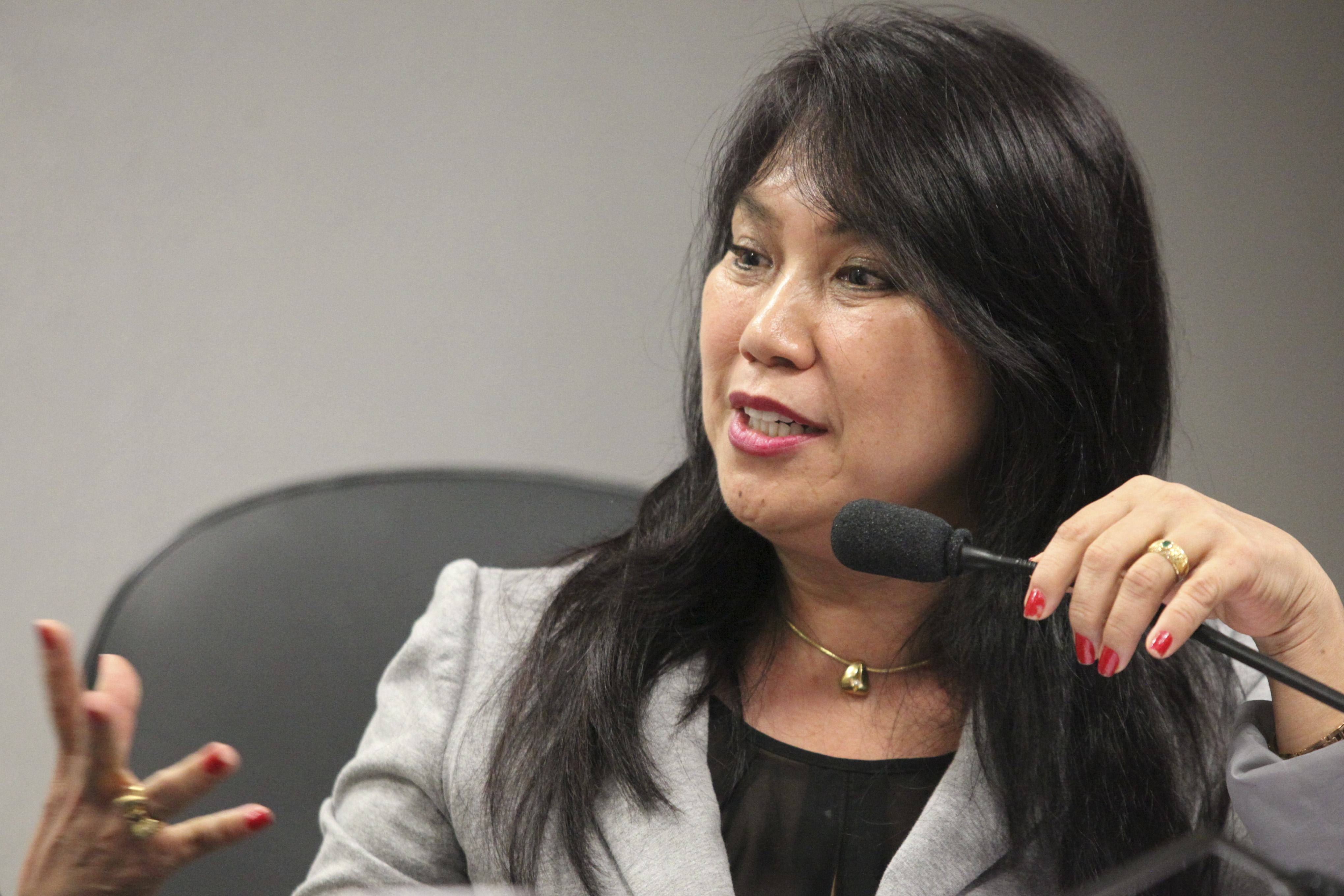 Sala de comissões do Senado Federal durante a Comissão Permanente Mista de Combate à Violência contra a Mulher (CMCVM) que realiza audiência pública com a ministra Eleonora Menicucci, sobre o enfrentamento à violência contra a mulher no Brasil. Em pronunciamento, vice-presidente da CMCVM, deputada Keiko Otta (PSB-SP). Foto: André Corrêa/Agência Senado.